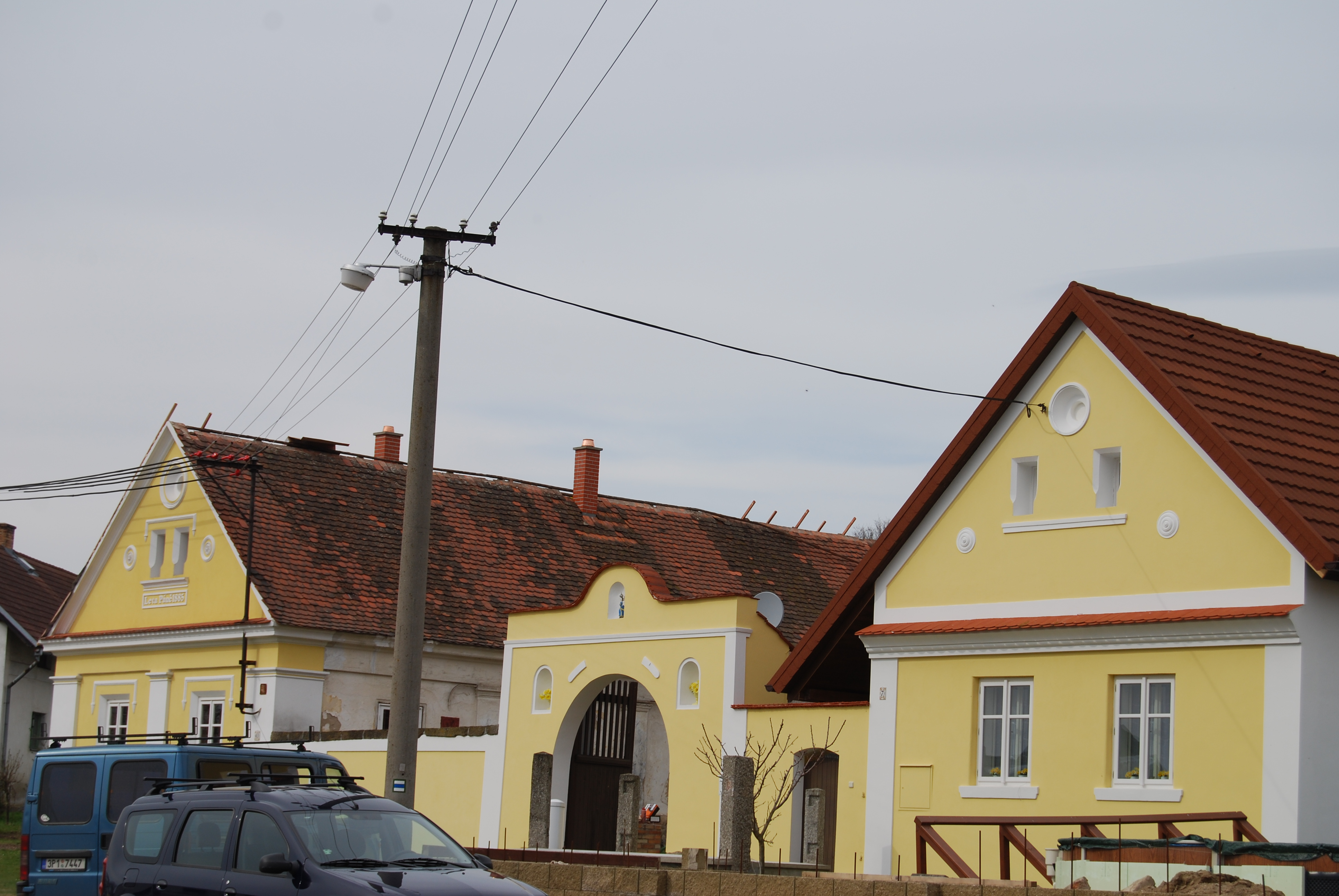 Usedlost v obci z roku 1885. Níkovice je vesnice, část obce Hrejkovice v okrese Písek. Česká republika.